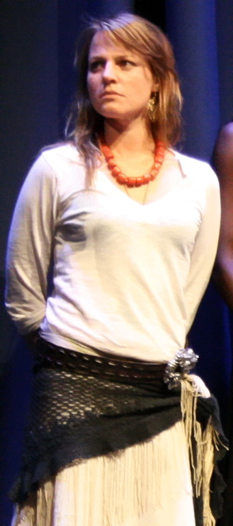 Schauspielerin Maria Simon bei der Premiere des Films Kongo beim Münchner Filmfest 2010.